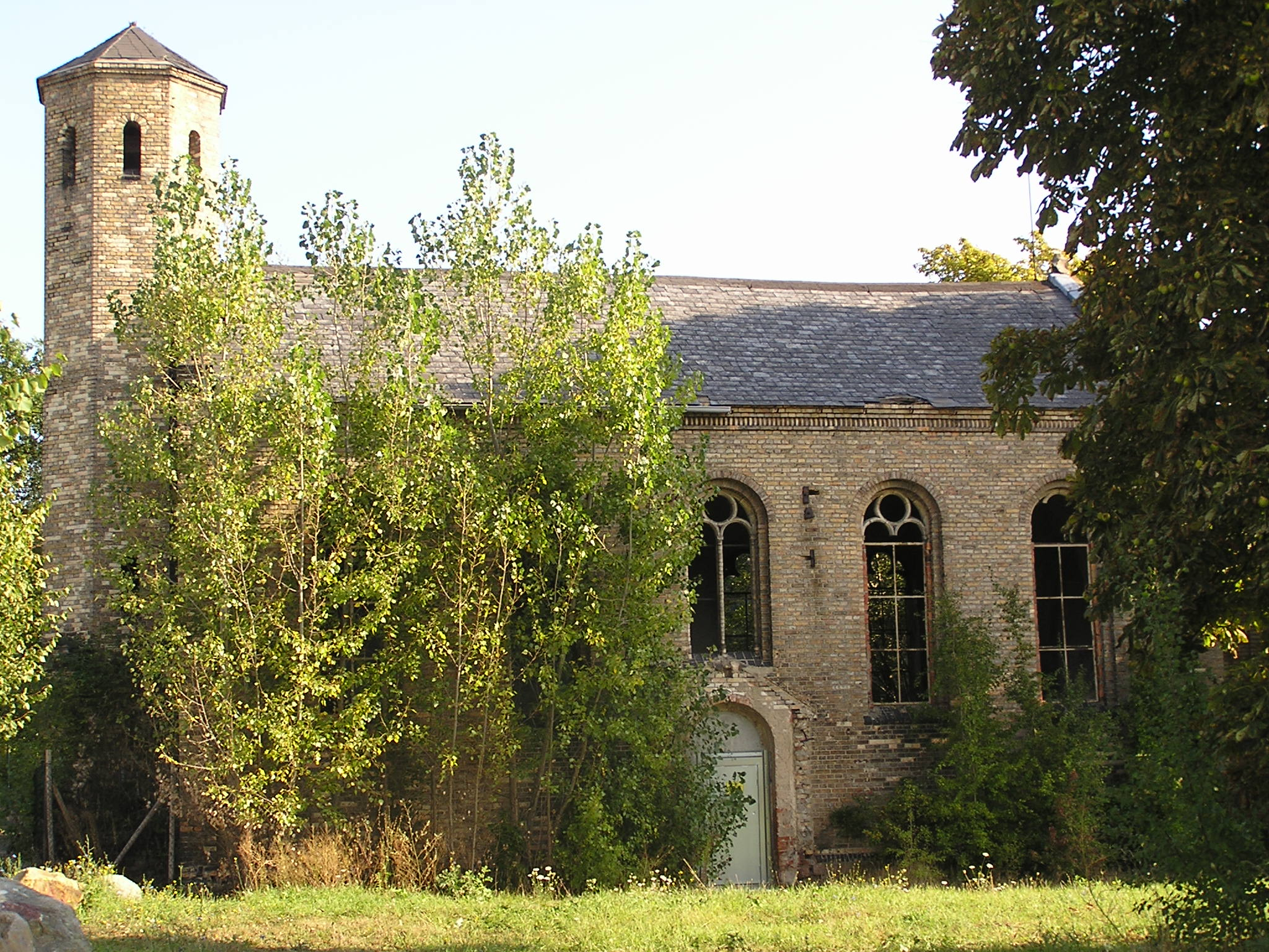 Kapelle der Heilanstalt Nietleben